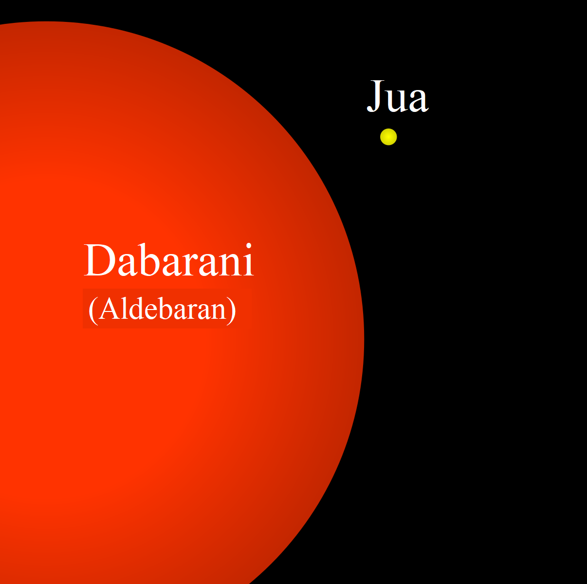 Kiswahili: Dabarani na Jua - kulinganisha ukubwa